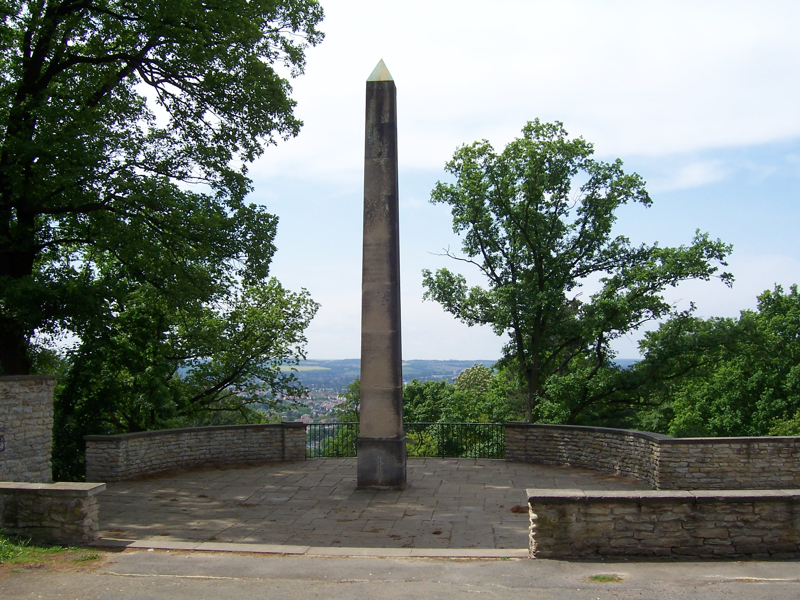 Obelisk (um 1860) von Joseph Herrmann in Gedenken an König Friedrich August II. an der Collenbuschstraße auf dem Weißen Hirsch in Dresden